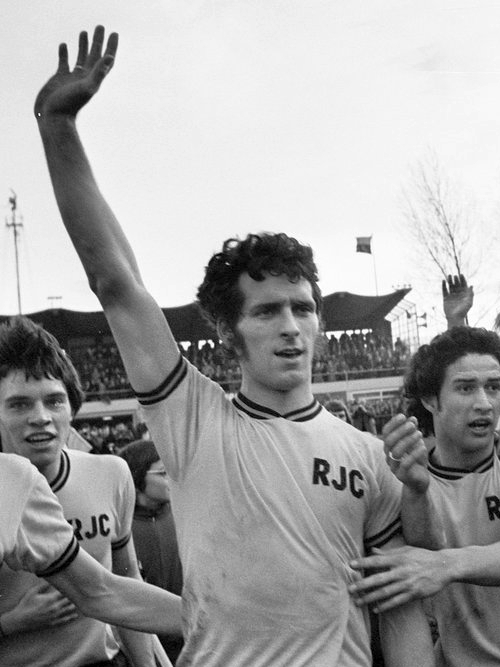 Roda JC tegen Feyenoord 1-0, vrolijke Roda-spelers na afloop. Dick Nanninga.